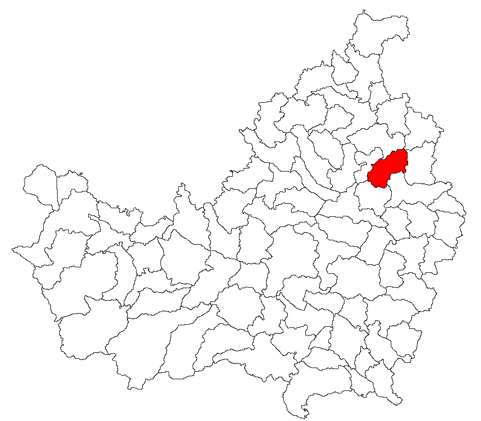 Categorie:Hărţi ale judeţului Cluj